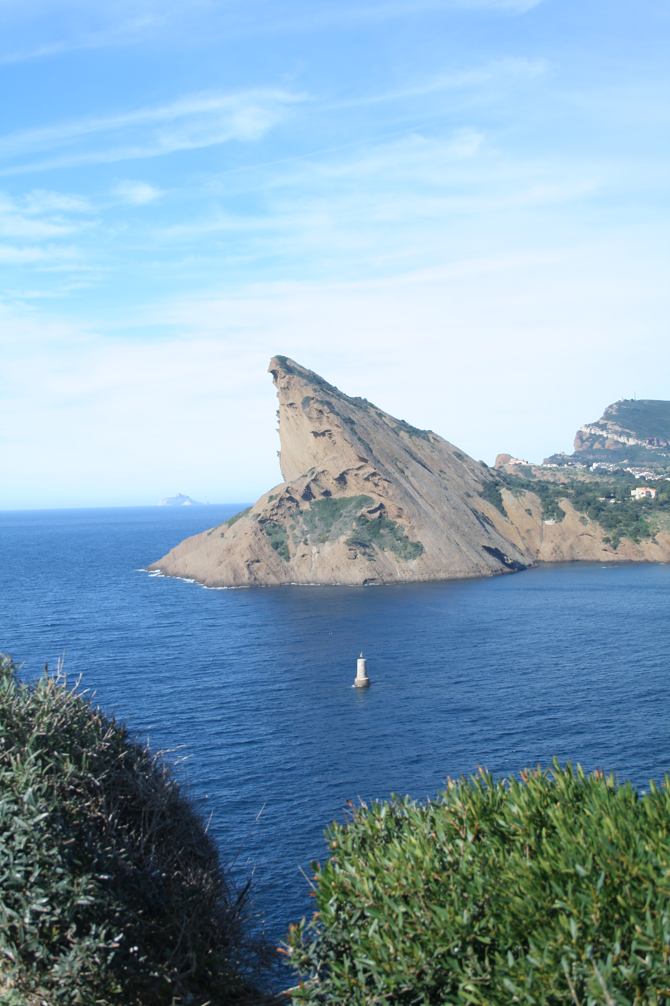 Le Bec de l'Aigle et l'île du Riou vus depuis l'Ile Verte